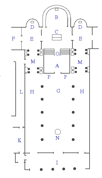 Plan d'une église typique du Moyen Âge